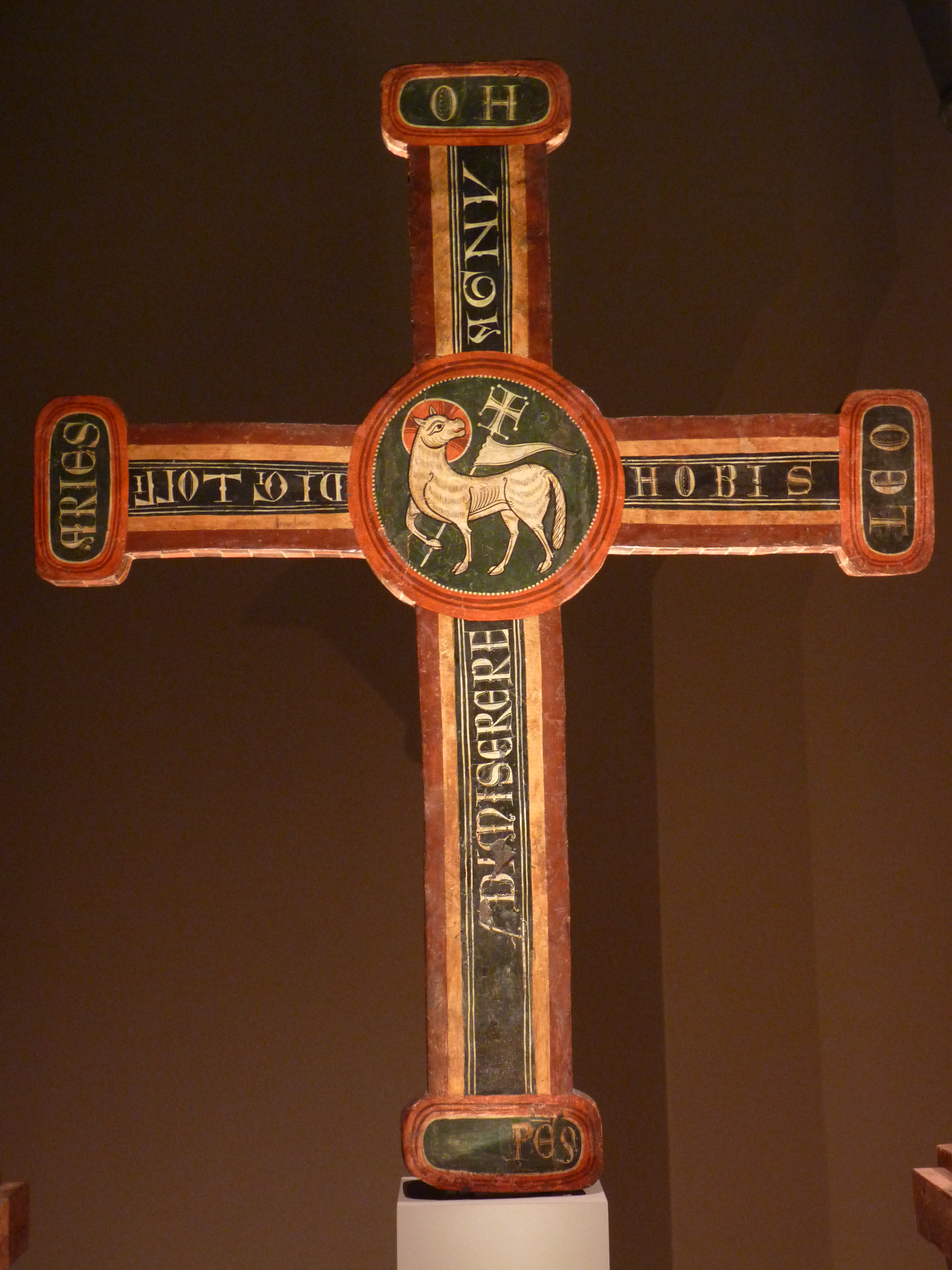 Baldaquí de Toses, primer terç del segle XIII